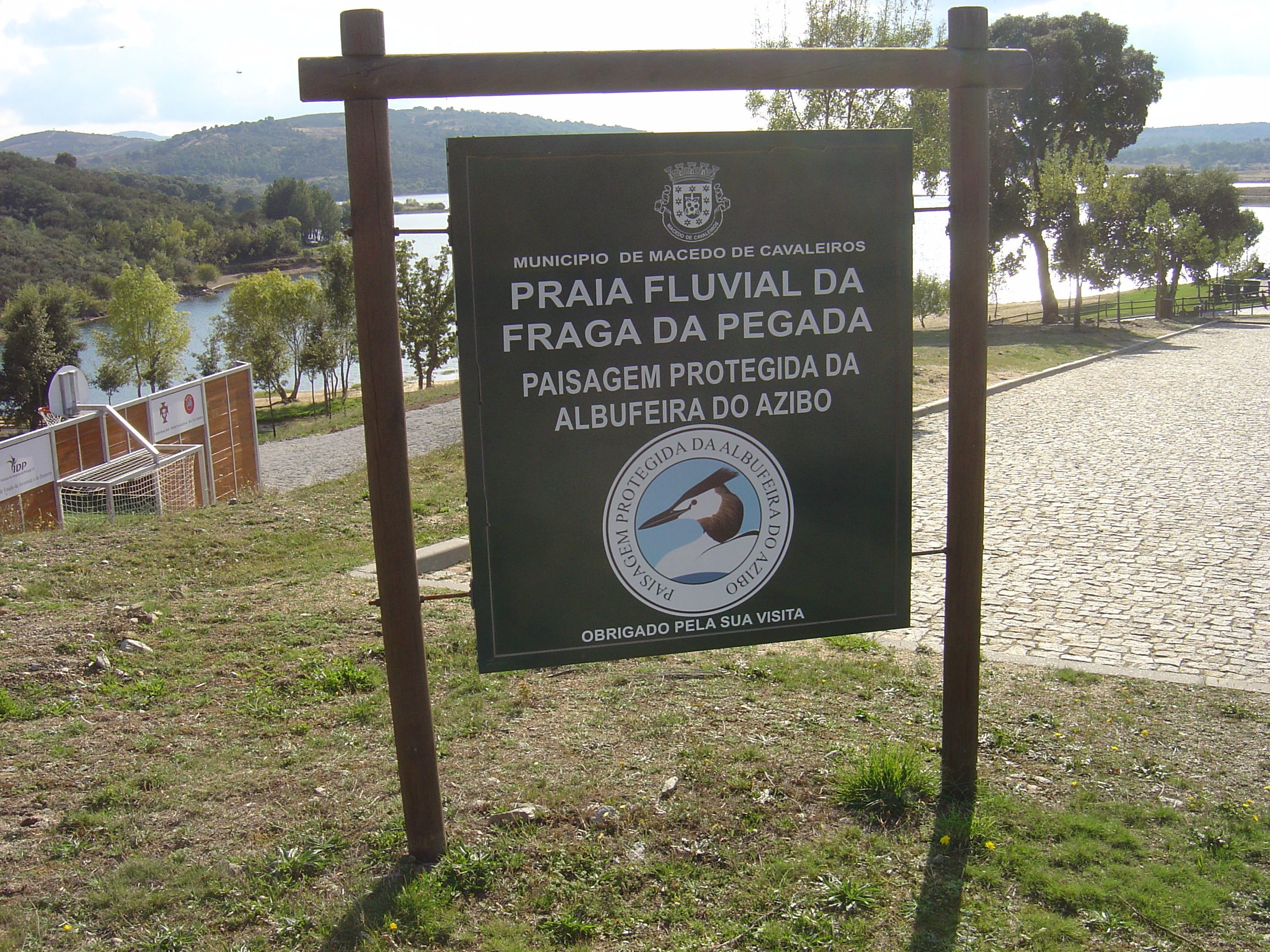 Azibo, Portugal